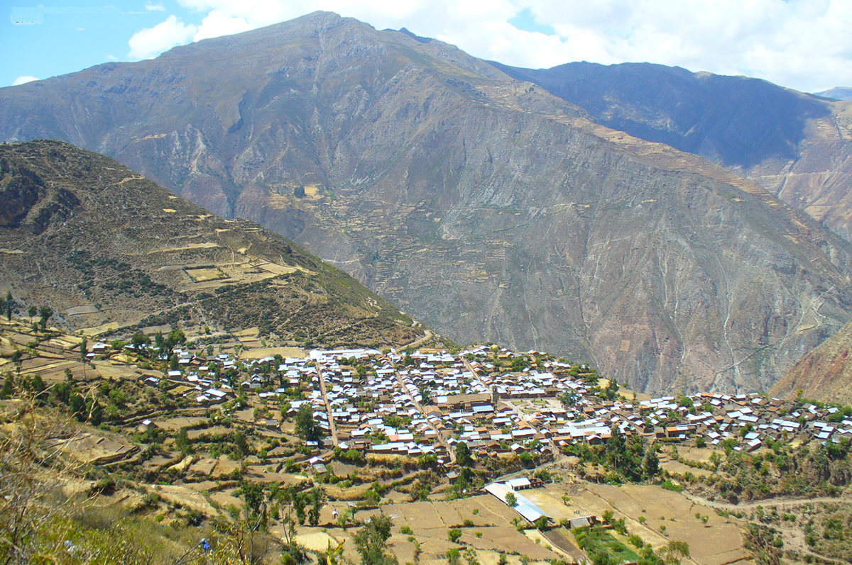 Vista panoramica de Sarhua